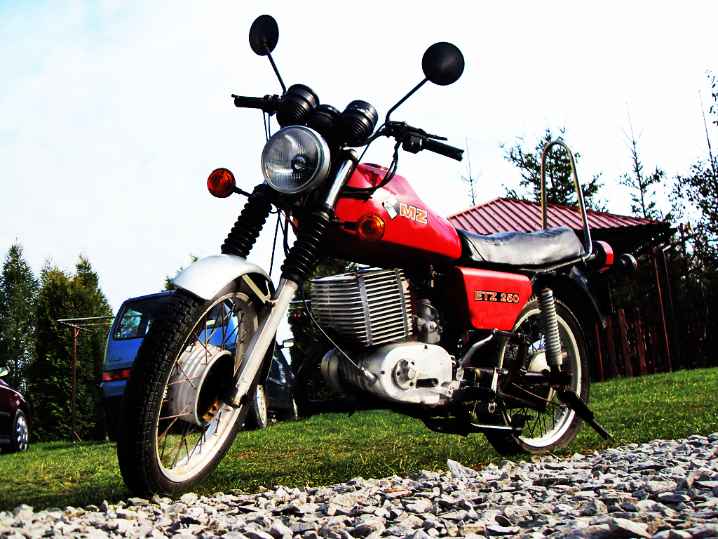 MZ ETZ 250 DDR by Suski